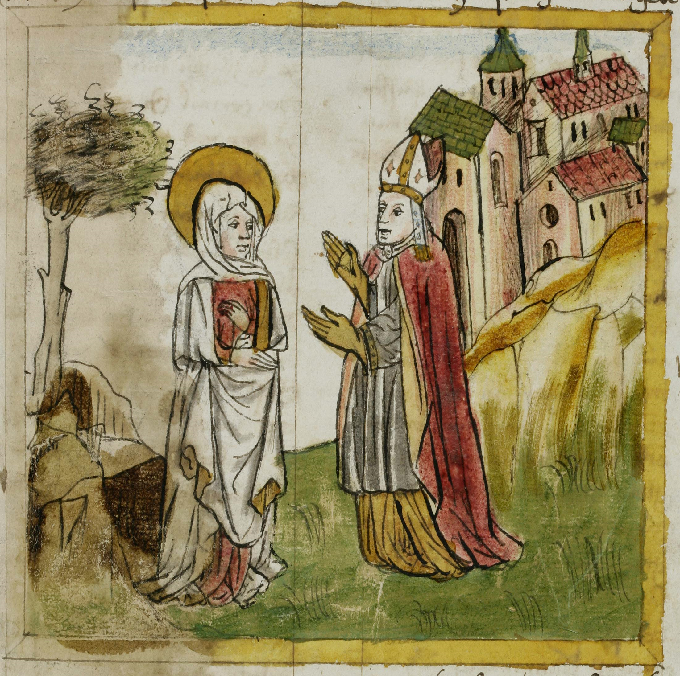 Wiborada im Gespräch mit Abt Salomo (als Salomo III. Bischof von Konstanz); Cod. sang. 260, S. 299